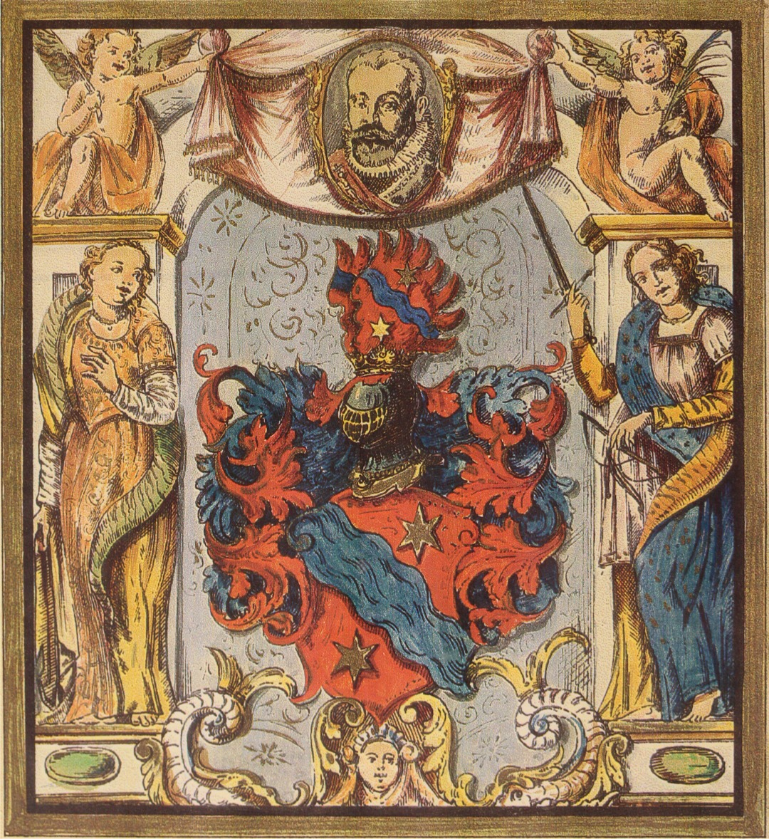 Wappendarstellung am Stammbaum der Famlie Stremayr